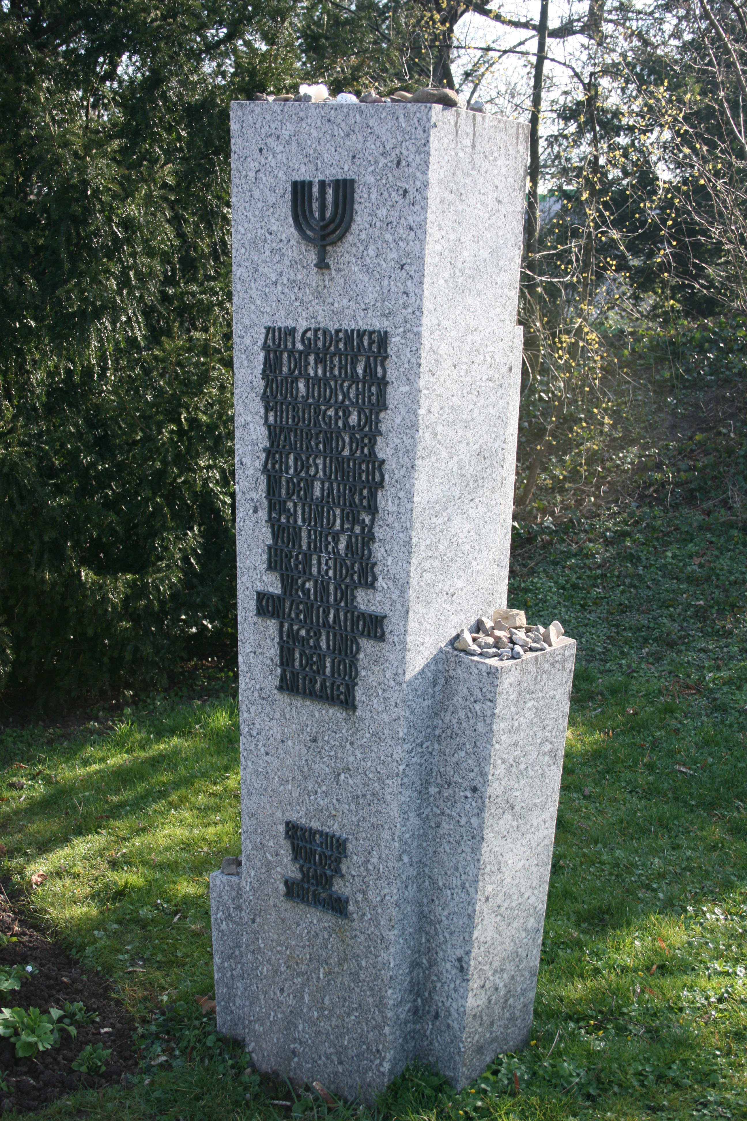 Gedenkstein im Höhenpark Killesberg, Stuttgart, Germany